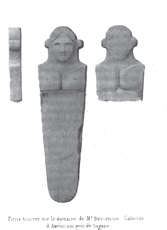 Vico, Ouest Corse (Corse) - Stantara d'Apricciani, pierre trouvée à Apricciani